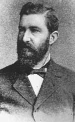 Portrait du capitaine David Perry.